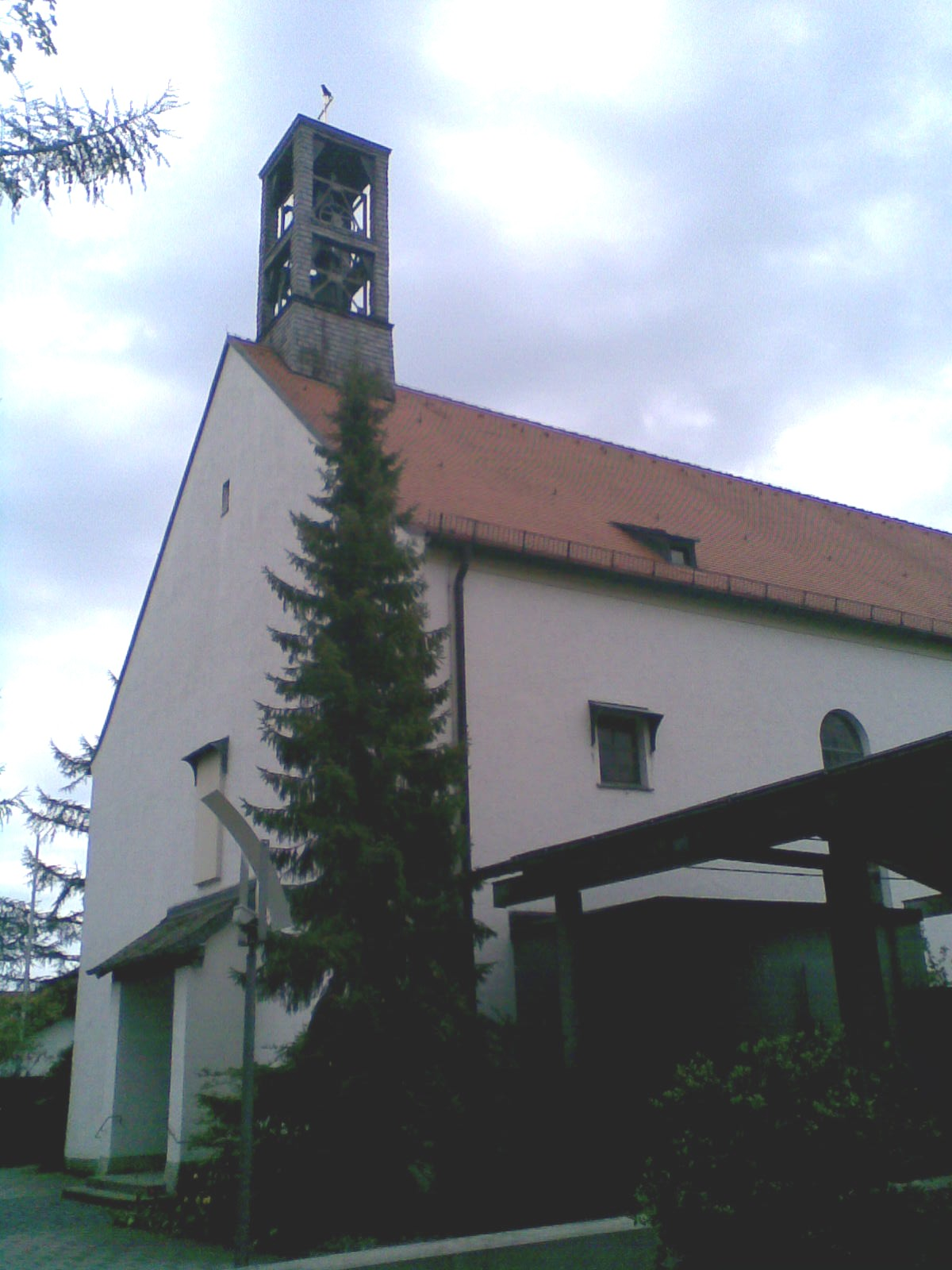 Kirche Christi Himmelfahrt in München